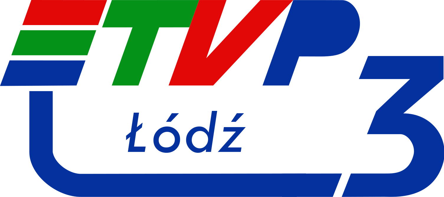 Logo TVP Łódź z lat 2000-2001